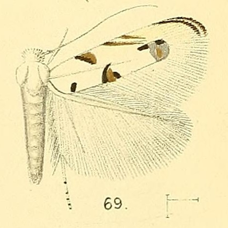 Crobylophora metallifera